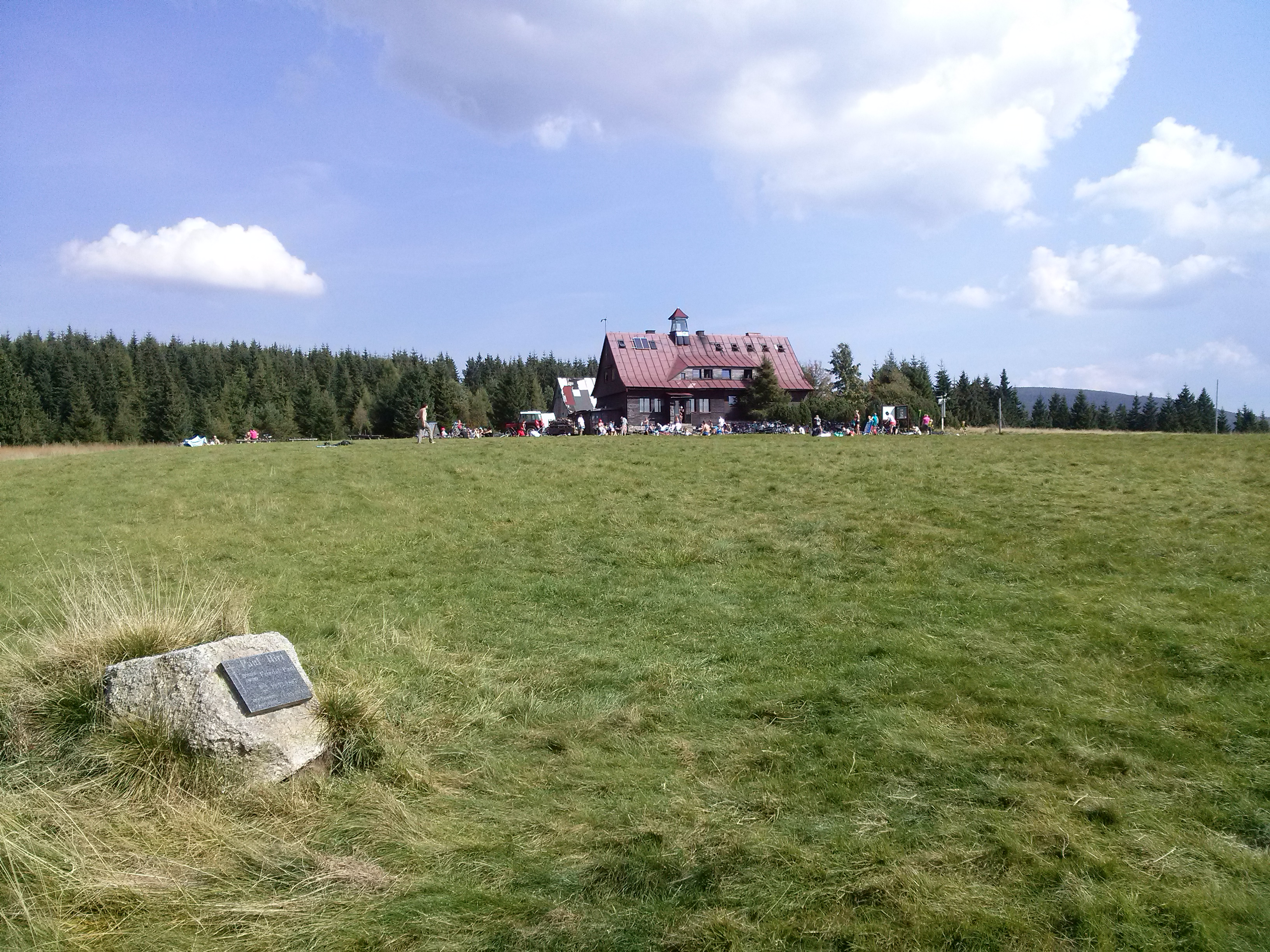 Hala Izerska lato 2016 - na pierwszym planie grób Paula Hirta, w tle Schronisko "Chatka Górzystów"